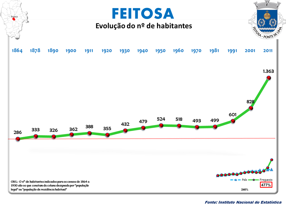 Censos 1864/2011